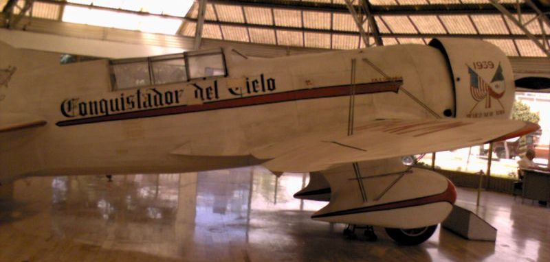 El Conquistador del Cielo, Avión en el que el CPA. Francisco Sarabia Tinoco impuso el record de vuelo sin escalas México - New York.